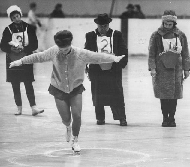 Gabriele Seyfert Zentralbild Kohls 11.1.1964 Deutsche Meisterschaften im Eiskunstlauf. Bei den Deutschen Meisterschaften im Eiskunstlauf, die am 10.1.1964 in der Berliner Werner-Seelenbinder-Halle begannen, haben sich nach der Pflicht mit Gabriele Seyfert (SC Karl-Marx-Stadt) und Ralph Borghardt (SC Dynamo Berlin) die Titelverteidiger erwartungsgemäß an die Spitze gesetzt. UBz: Aufmerksam verfolgen die Kampfrichter eine Pflichtfigur von Gaby Seyfert.